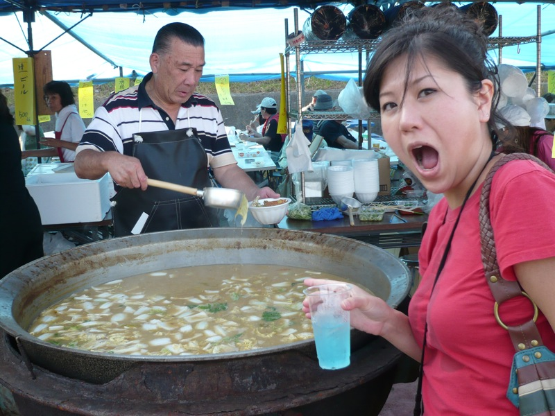 Giant crab nabe. 登別漁港まつり